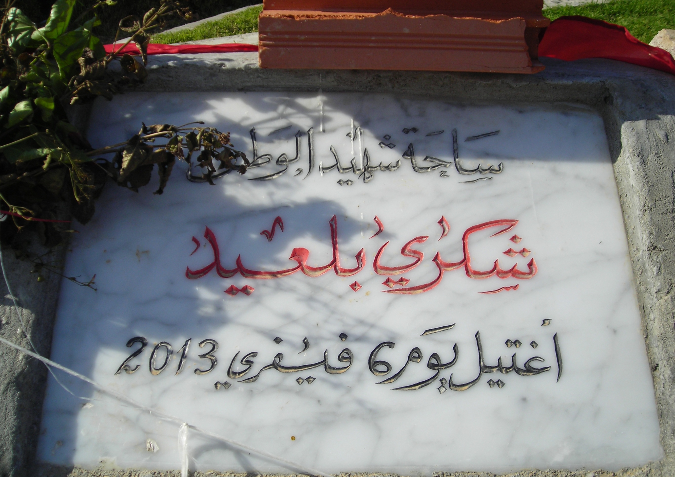 Place Chokri Belaid